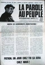 La Parole au Peuple, groupe mao-spontex en Belgique n°1 du journal